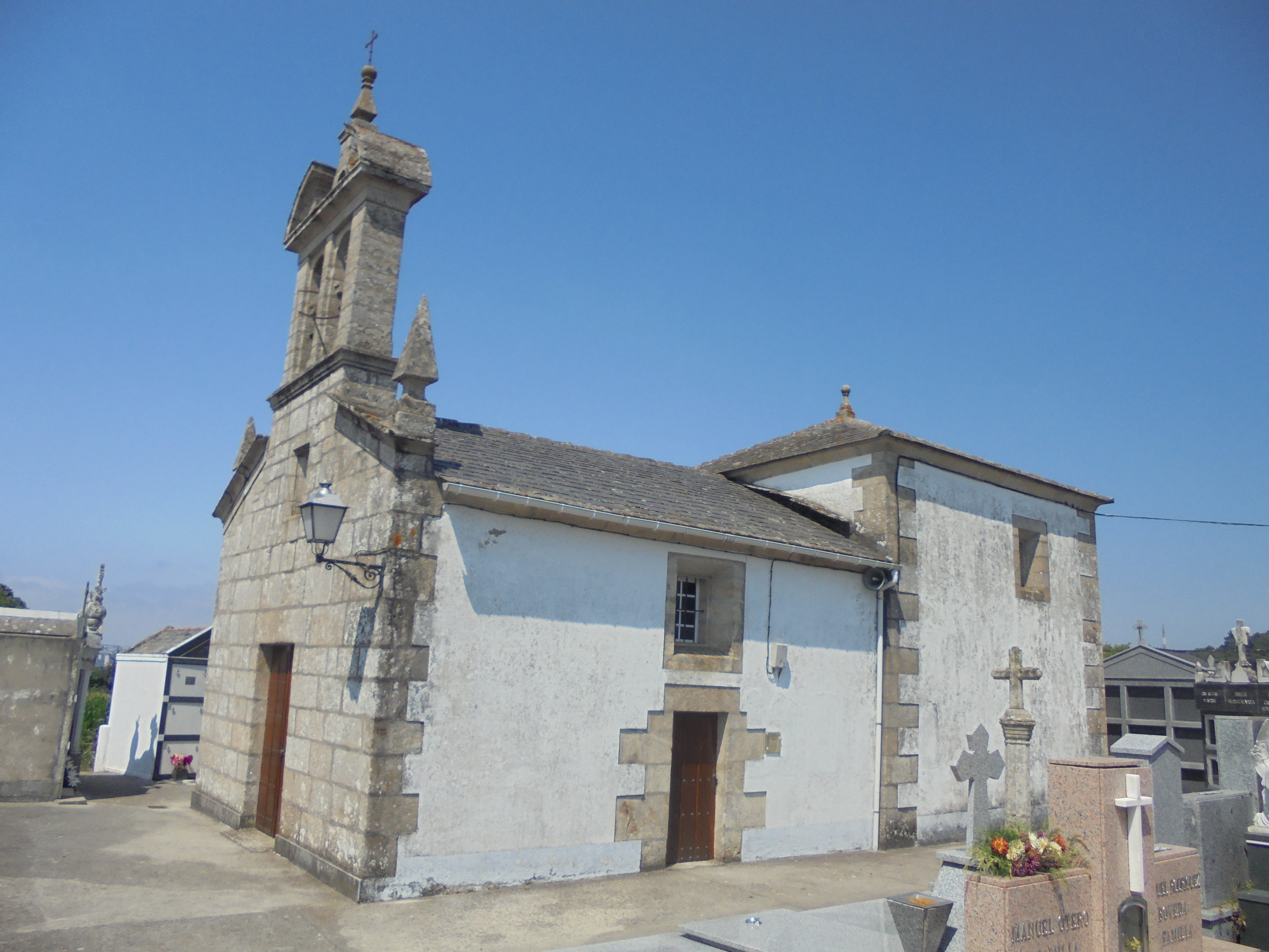 Igrexa parroquial de Santiago de Piúgos (Lugo)